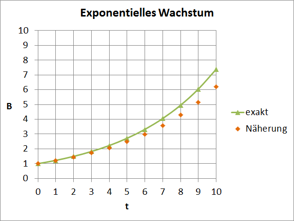 Dieser Graph zeigt exponentielles Wachstum.